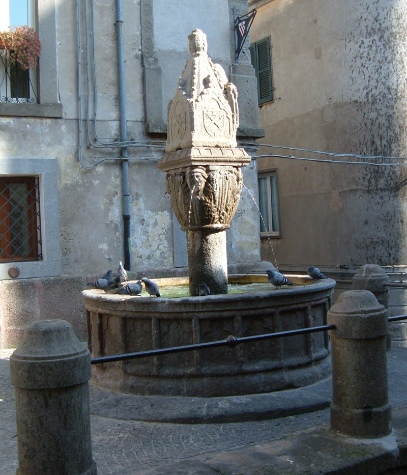 Soriano nel Cimino, provincia di Viterbo. Fontana detta "Fontana vecchia".